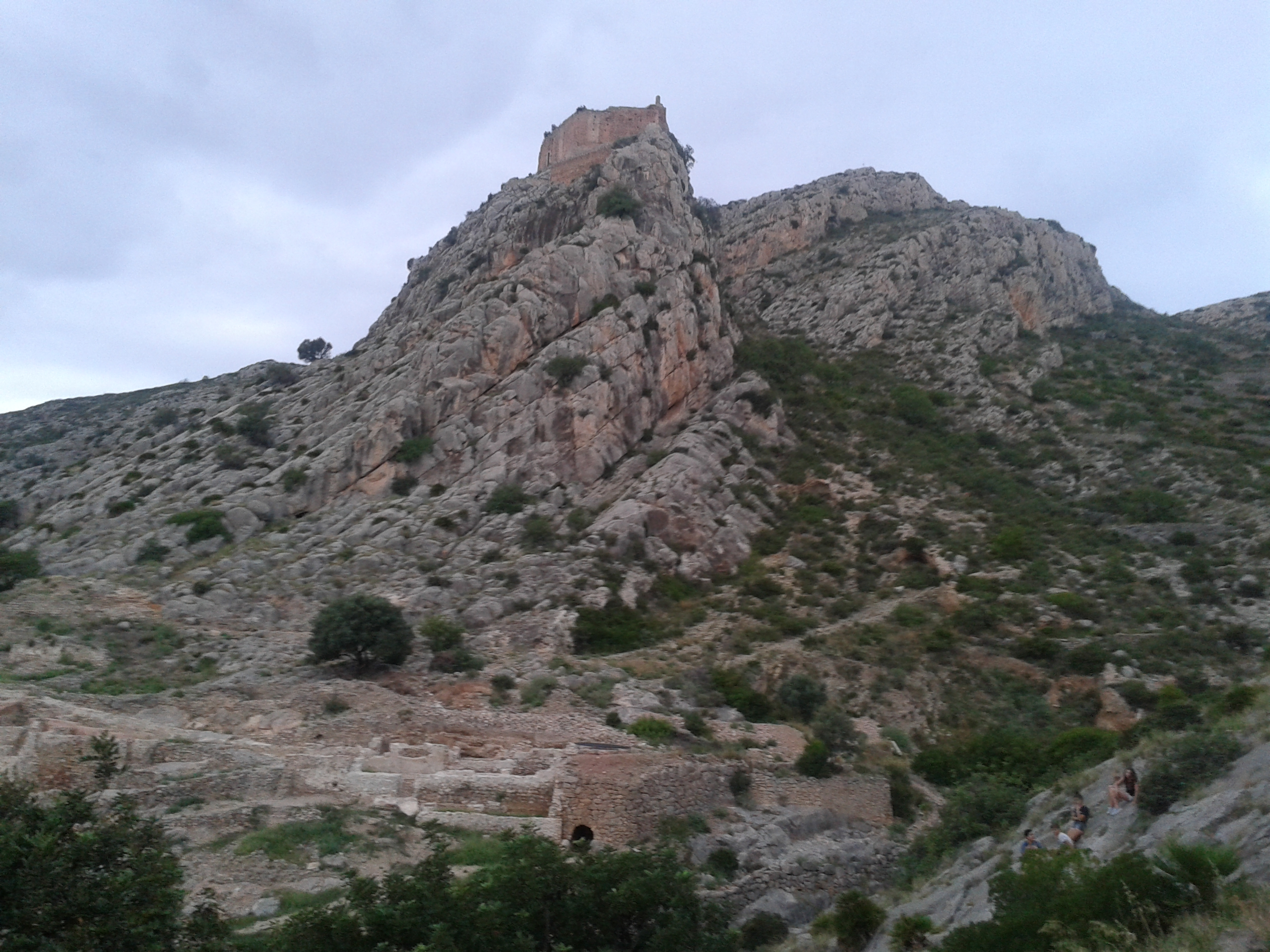 Morería de Borriol